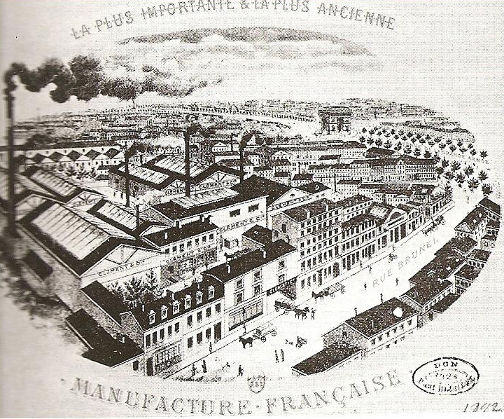 Papier à lettre usine Clement rue Brunel Paris 17